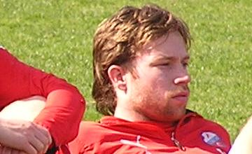 Gregoor van Dijk, Dutch footballer